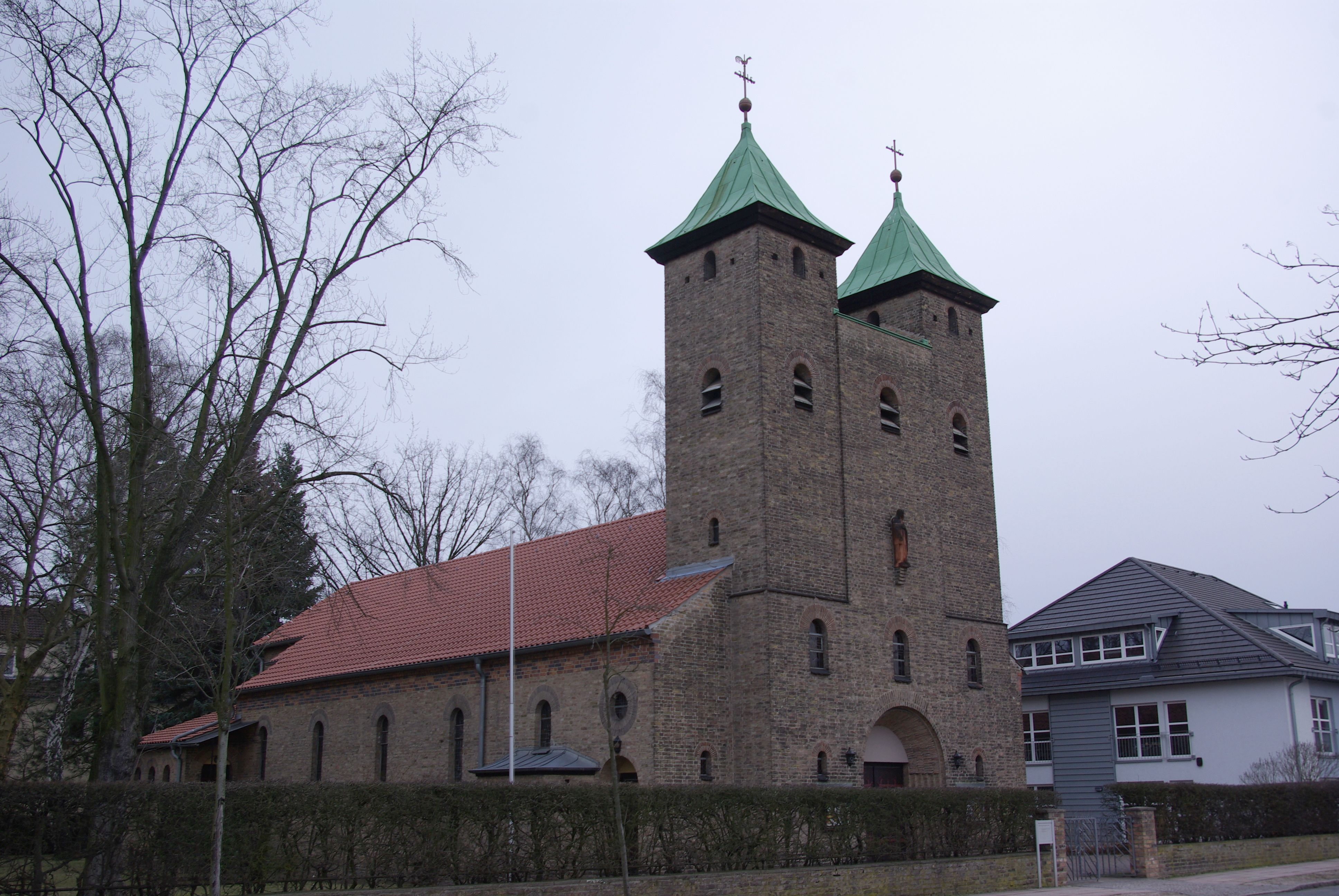 Königs Wusterhausen in Brandenburg. Die katholische Kirche in der Friedrich-Engels-Straße 6. Die Grundsteinlegung war am 28.02.1937. Die Kirche ist denkmalgeschützt (geotags in den exif-daten).